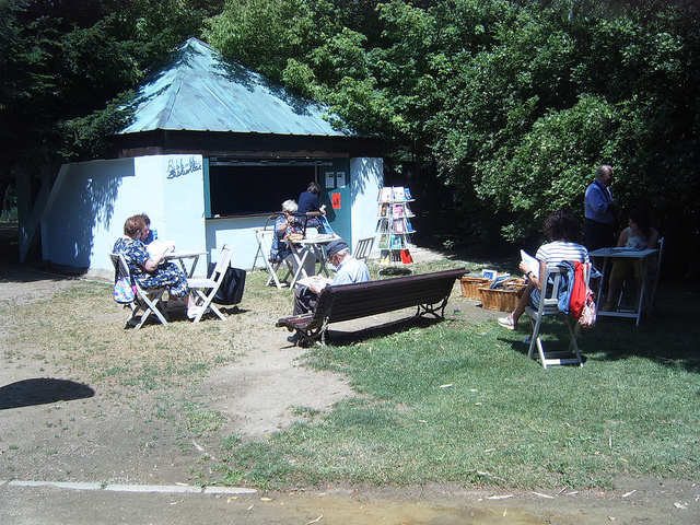 Bibliollac